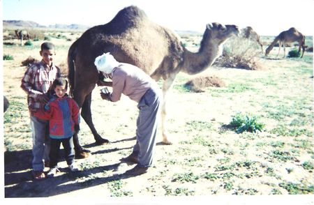 Chameau à Koudiat Zrigat, Béchar, (Algérie)